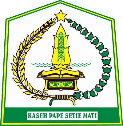 Lambang Kabupaten Aceh Tamiang, Aceh, Indonesia